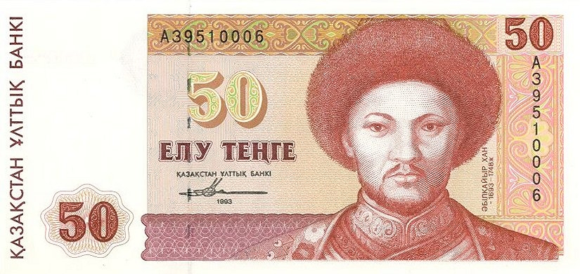 50 тенге 1993 года